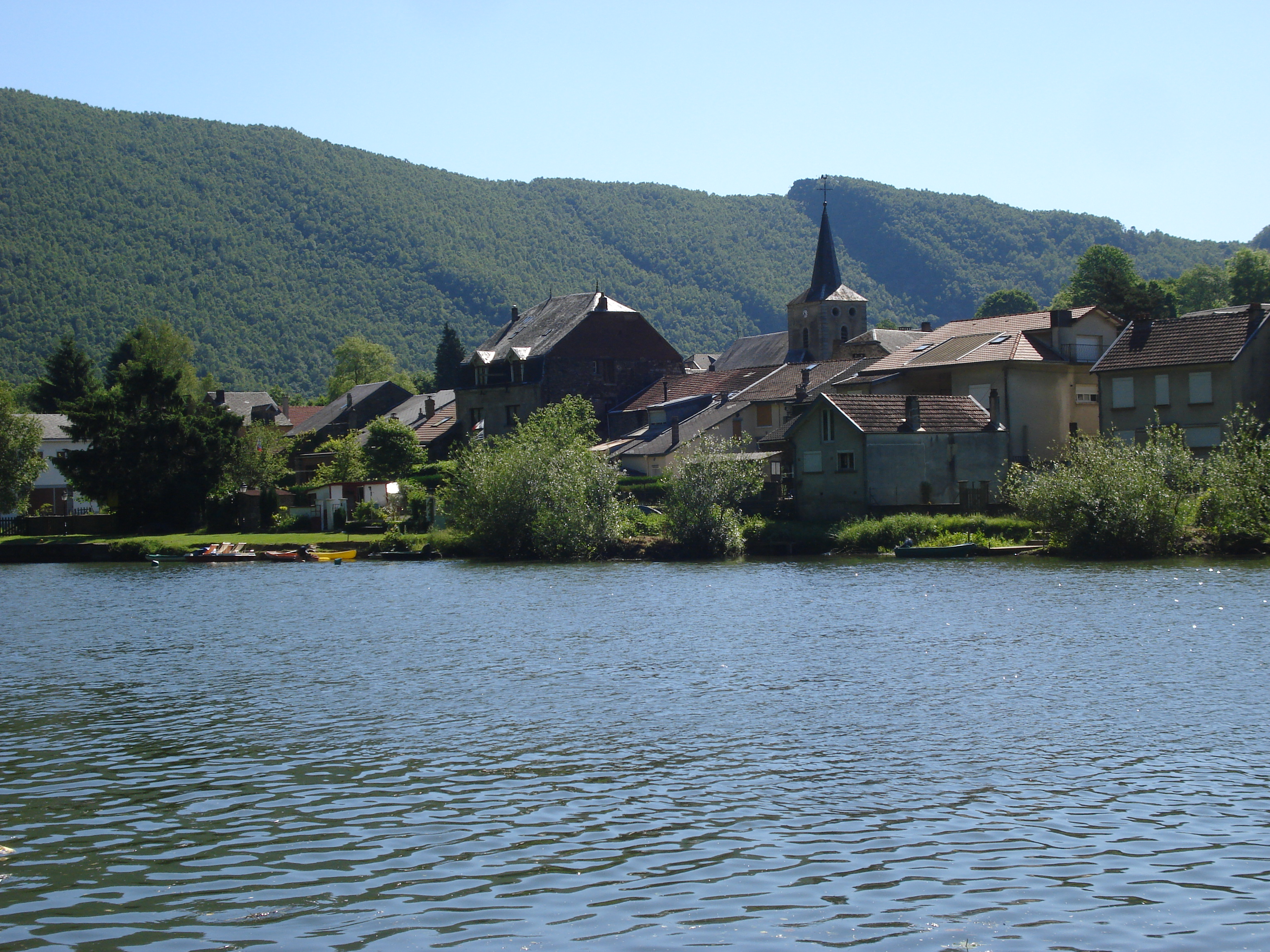 Vue sur Laifour (Ardennes, Fr); au fond: Les Dames de Meuse (rochers)